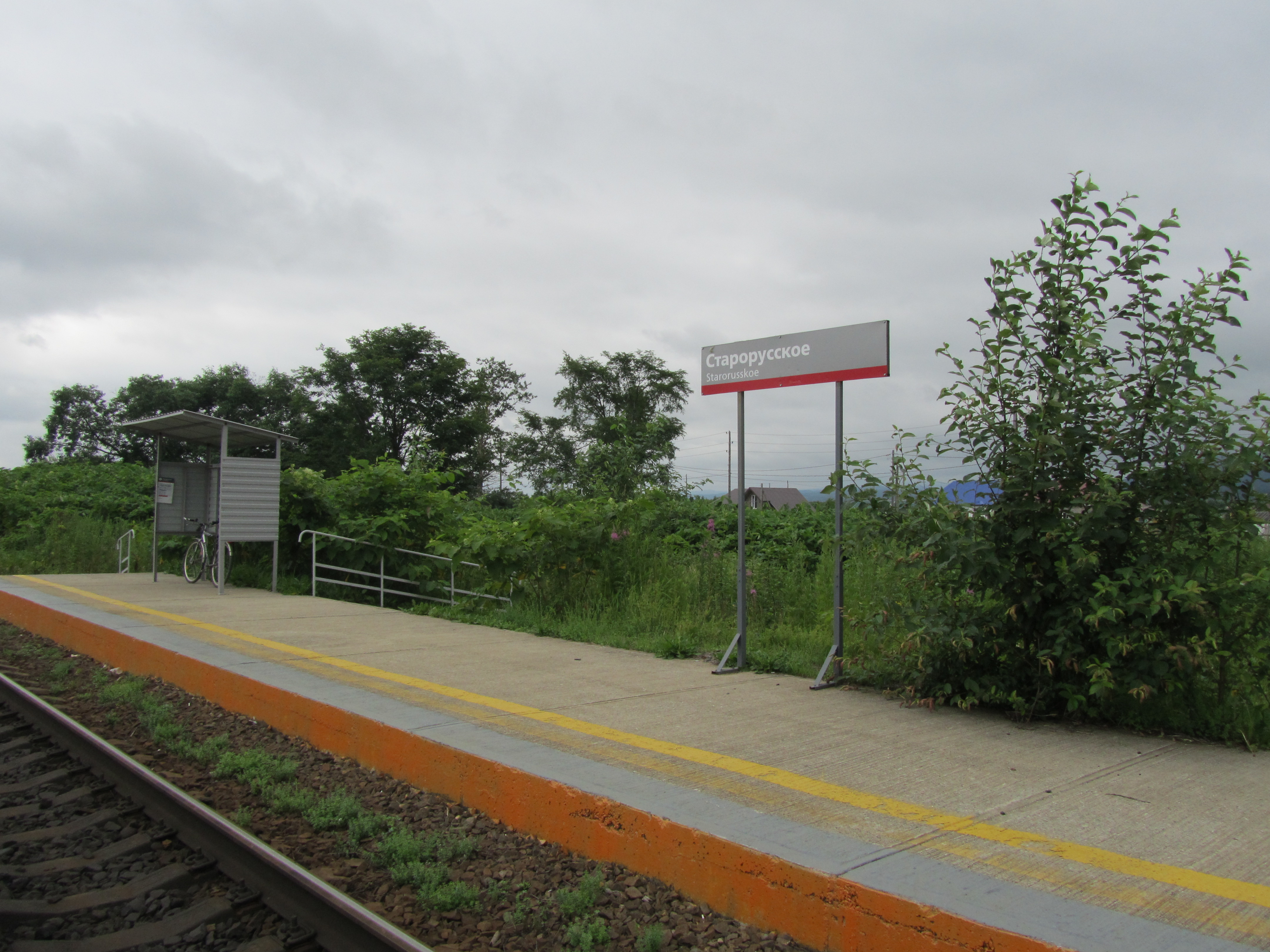 Сахалинский регион Дальневосточной железной дороги, станция Старорусское